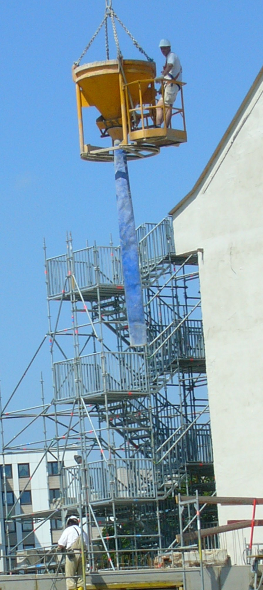 Verlastung eines Betonkorbes mit Bediener.